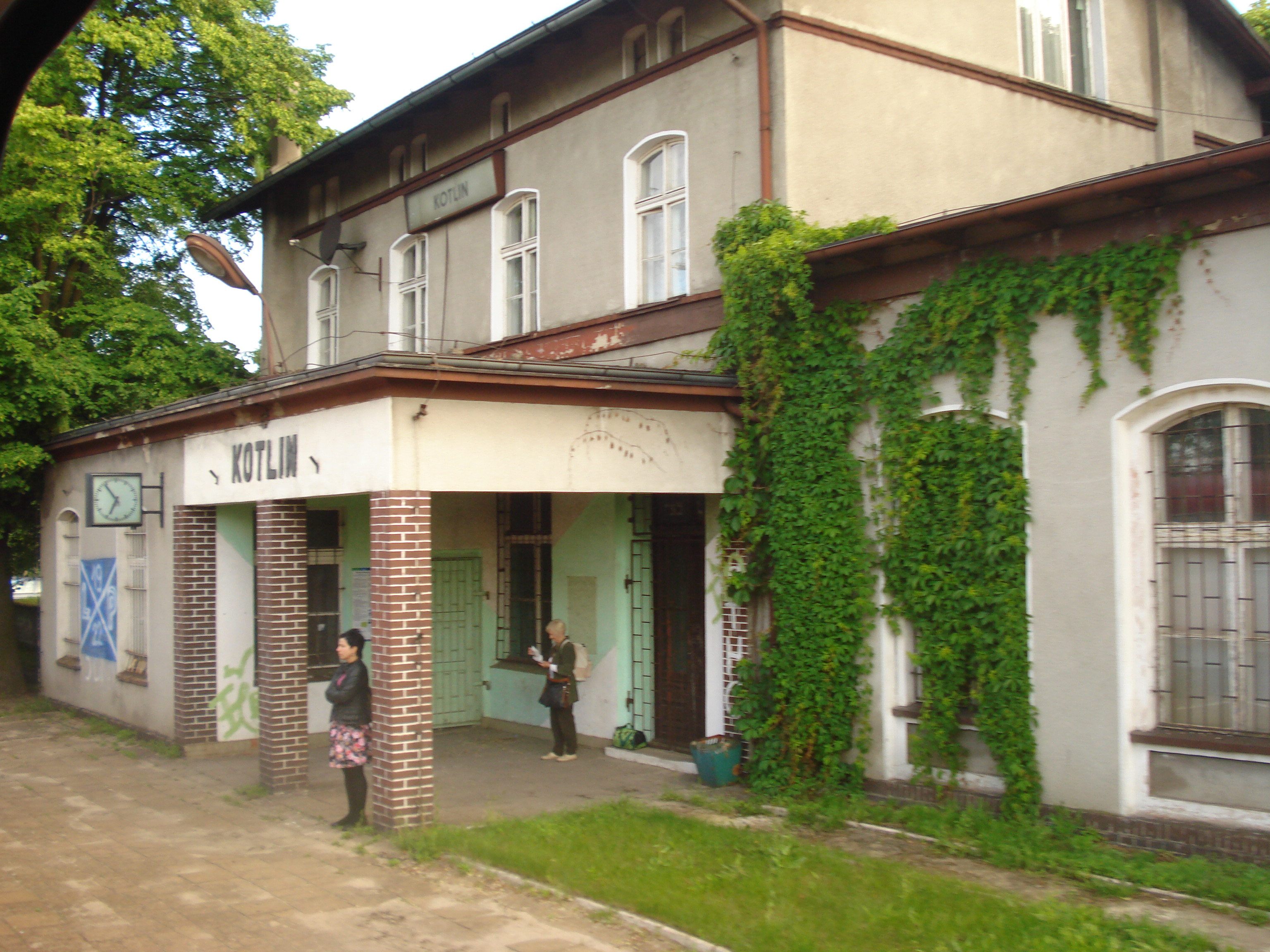 Stacja Kolejowa w Kotlinie